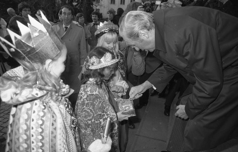 Bundespräsident Karl Carstens empfängt Sternsinger